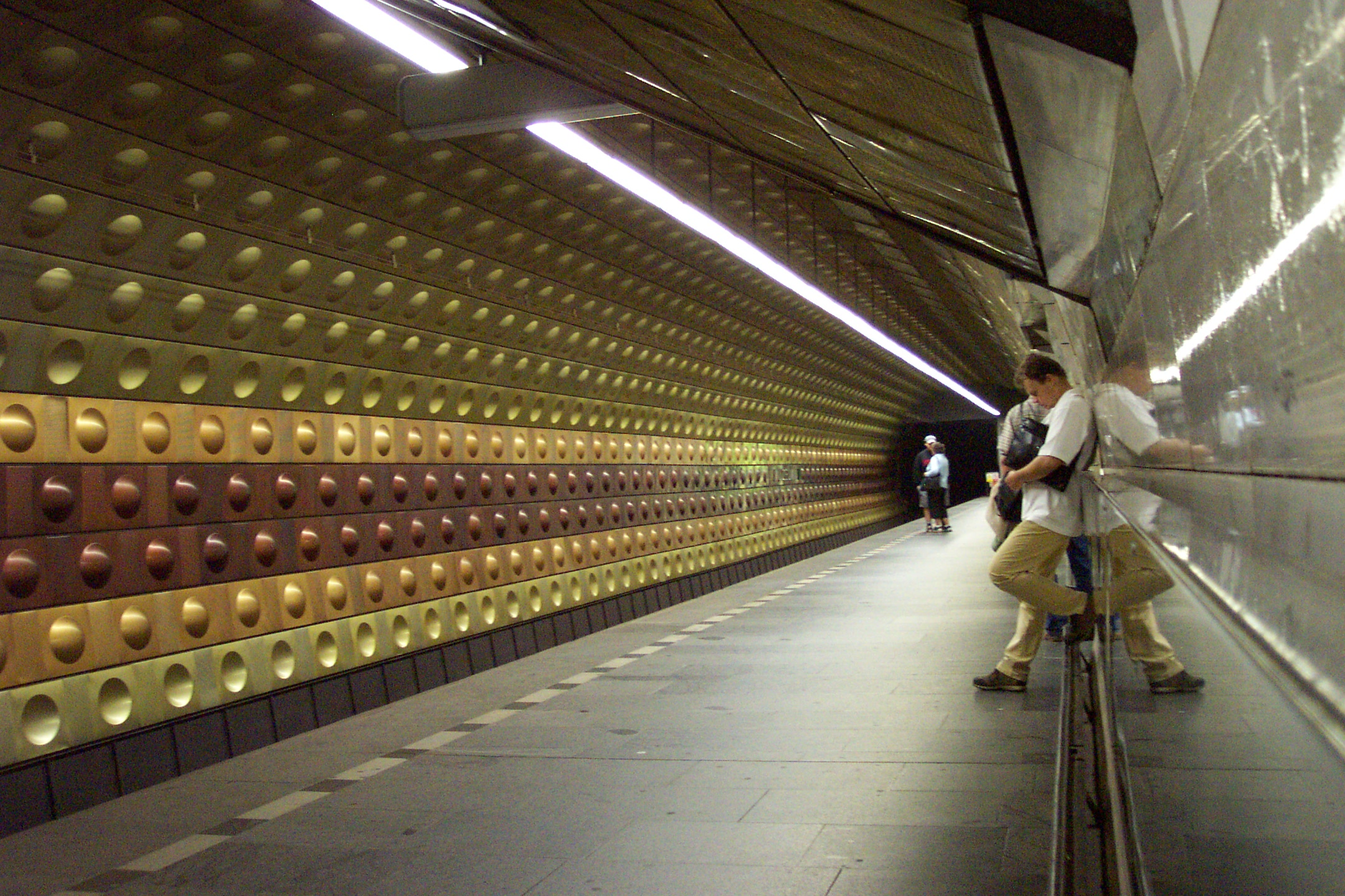 Metro station Muzeum (line A) in Prague - Stanice metra Muzeum (trasa A) v Praze